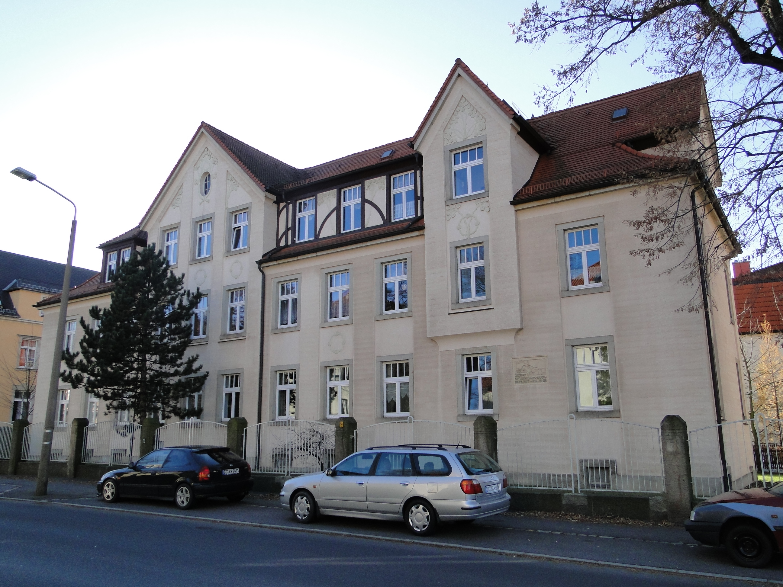 Doppelhaus Coschützer Straße 54/56 in Dresden-Plauen